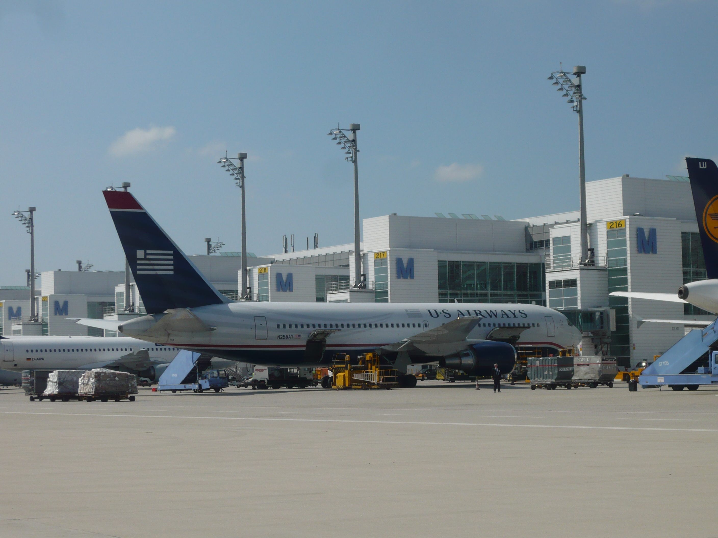 Boeing 767-200ER der US Airways an einer Abstellposition am Hauptgebäude des Terminal 2 am Flughafen München Franz Josef Strauß